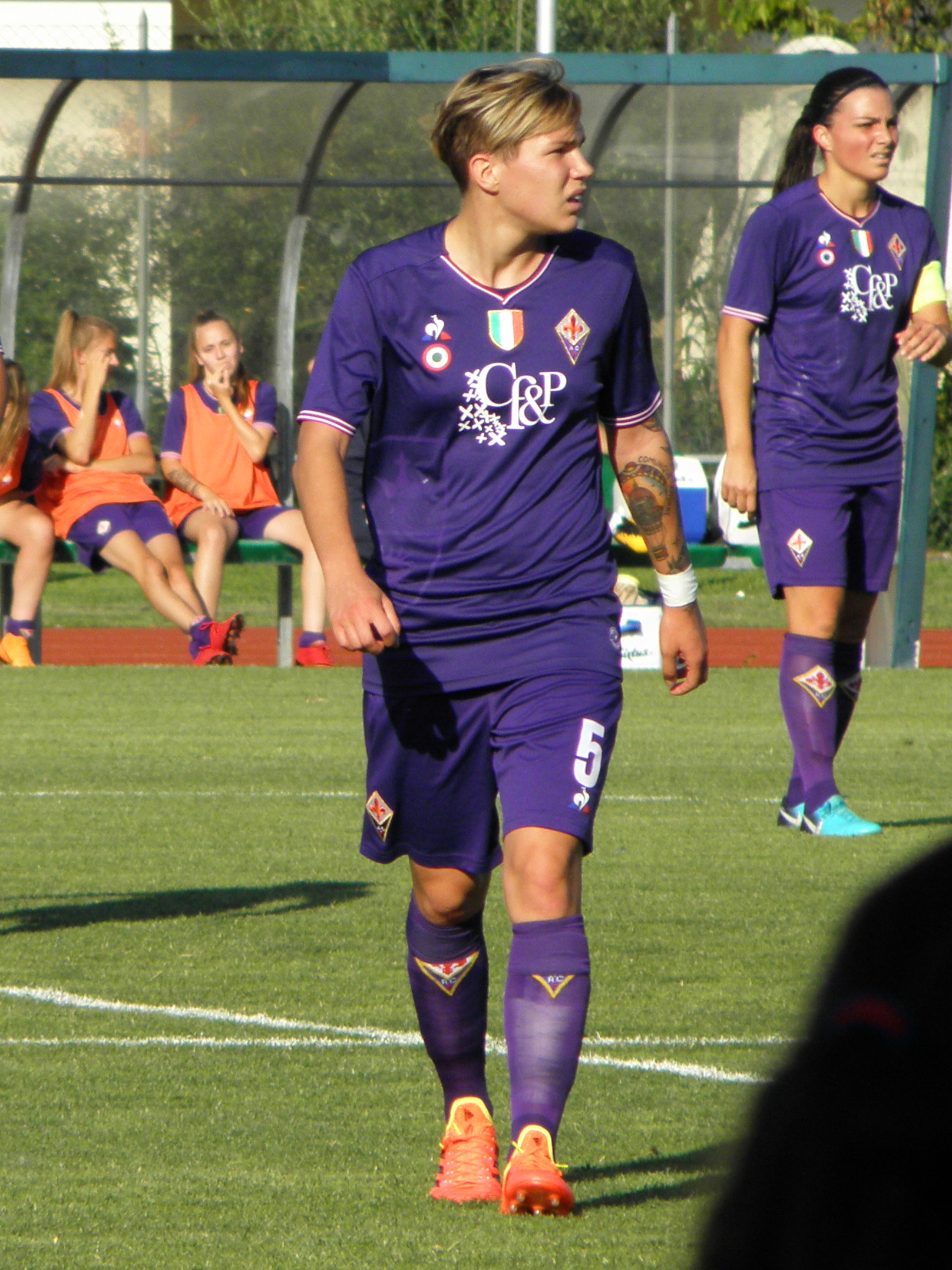 Abano Terme, Stadio delle Terme: 16 giugno 2018, spareggio UEFA Women's Champions League. Elena Linari.